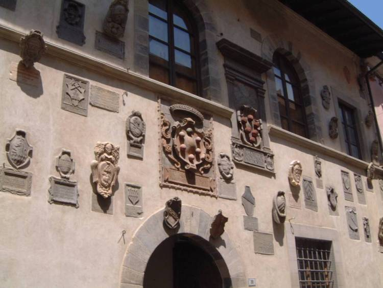 Je suis l'auteur de cette photo prise à Bagno di Romagna en 2004.